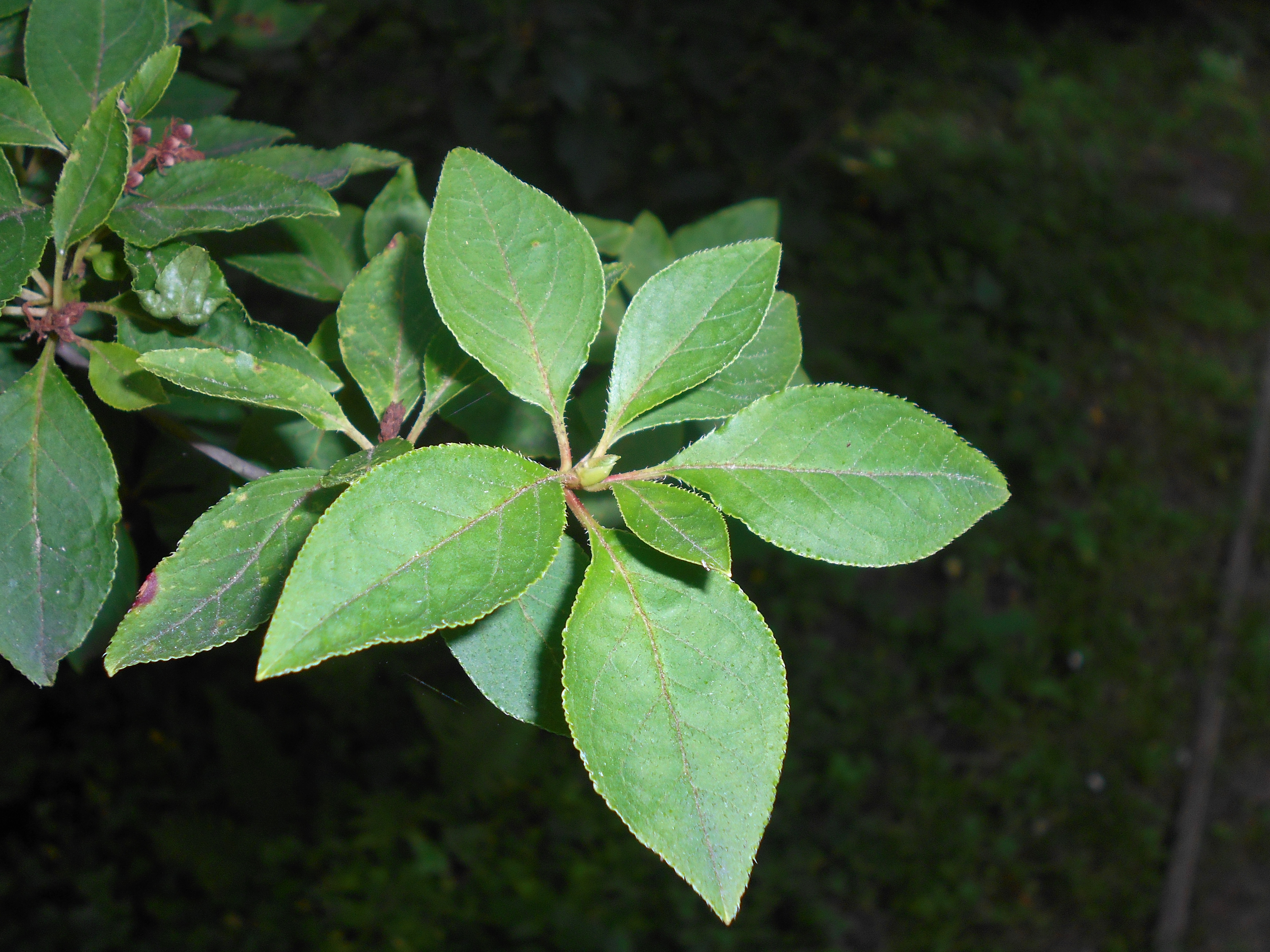 Enkiant dzwonkowaty (Enkianthus campanulatus), Arboretum w Rogowie.